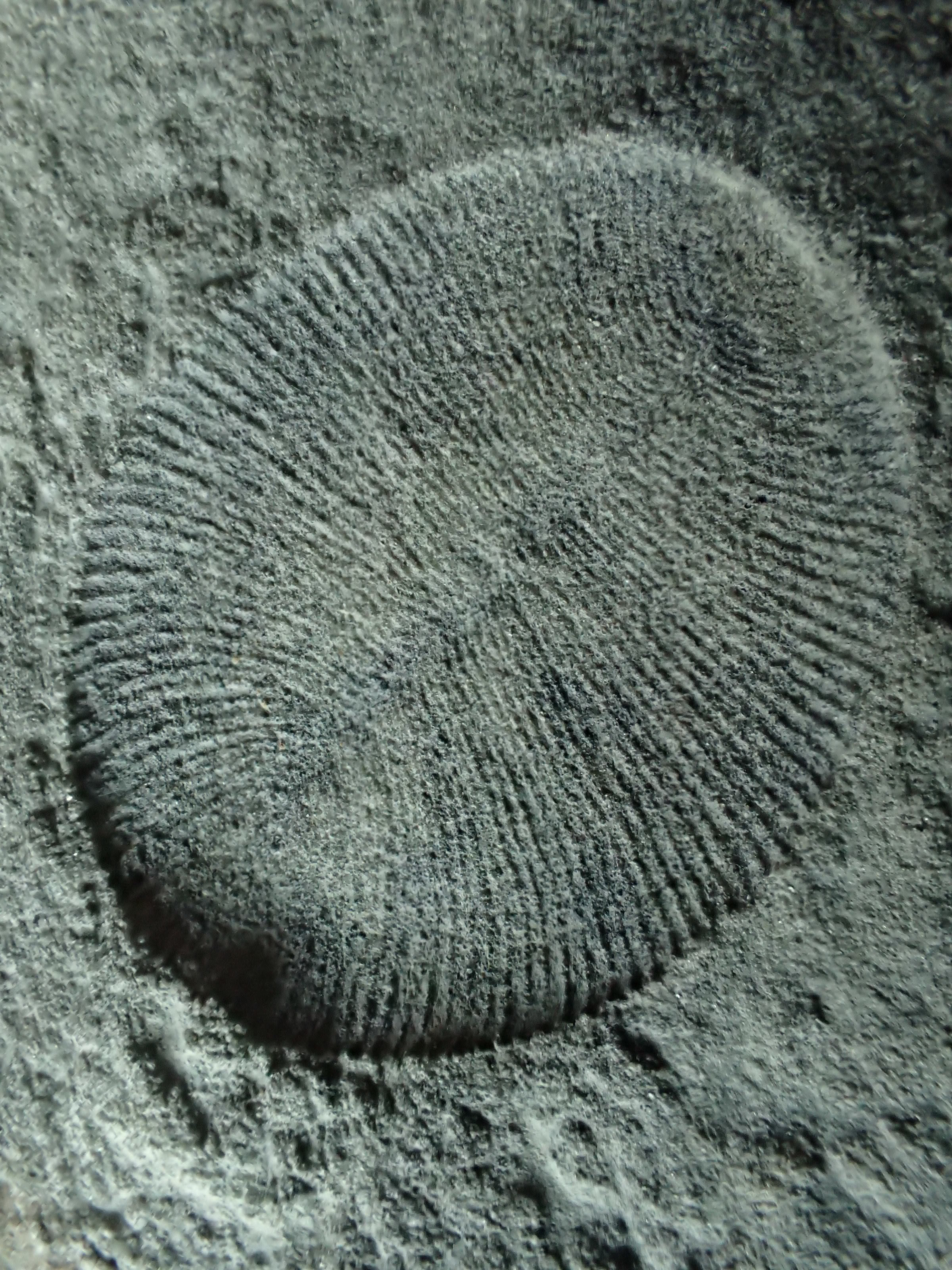 Dickinsonia tenuis ディッキンソニア Ediacaran biota エディアカラ生物群